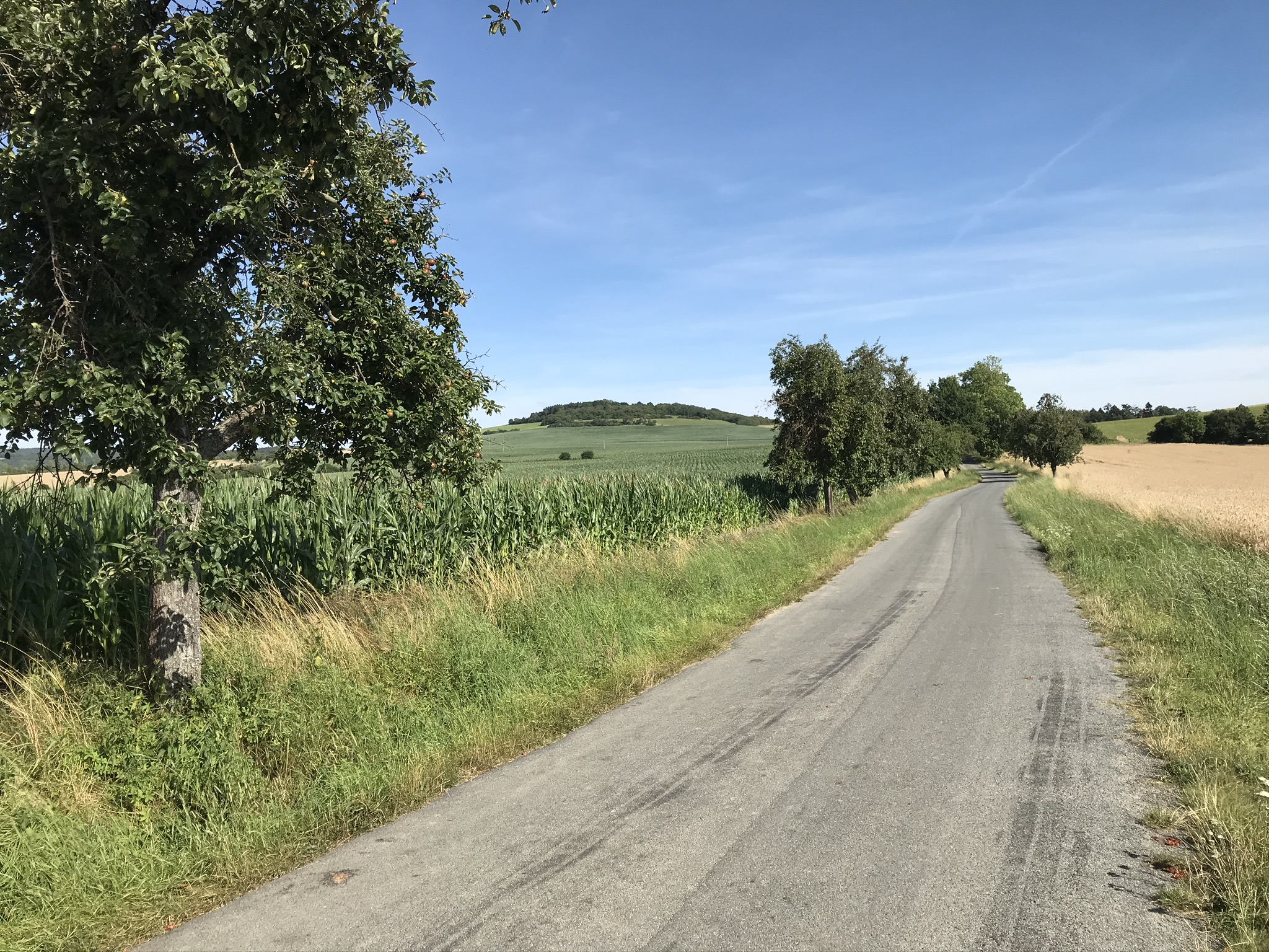 Pohled na vrch Oběšený u Blovic směrem od Bohušova (od severu)